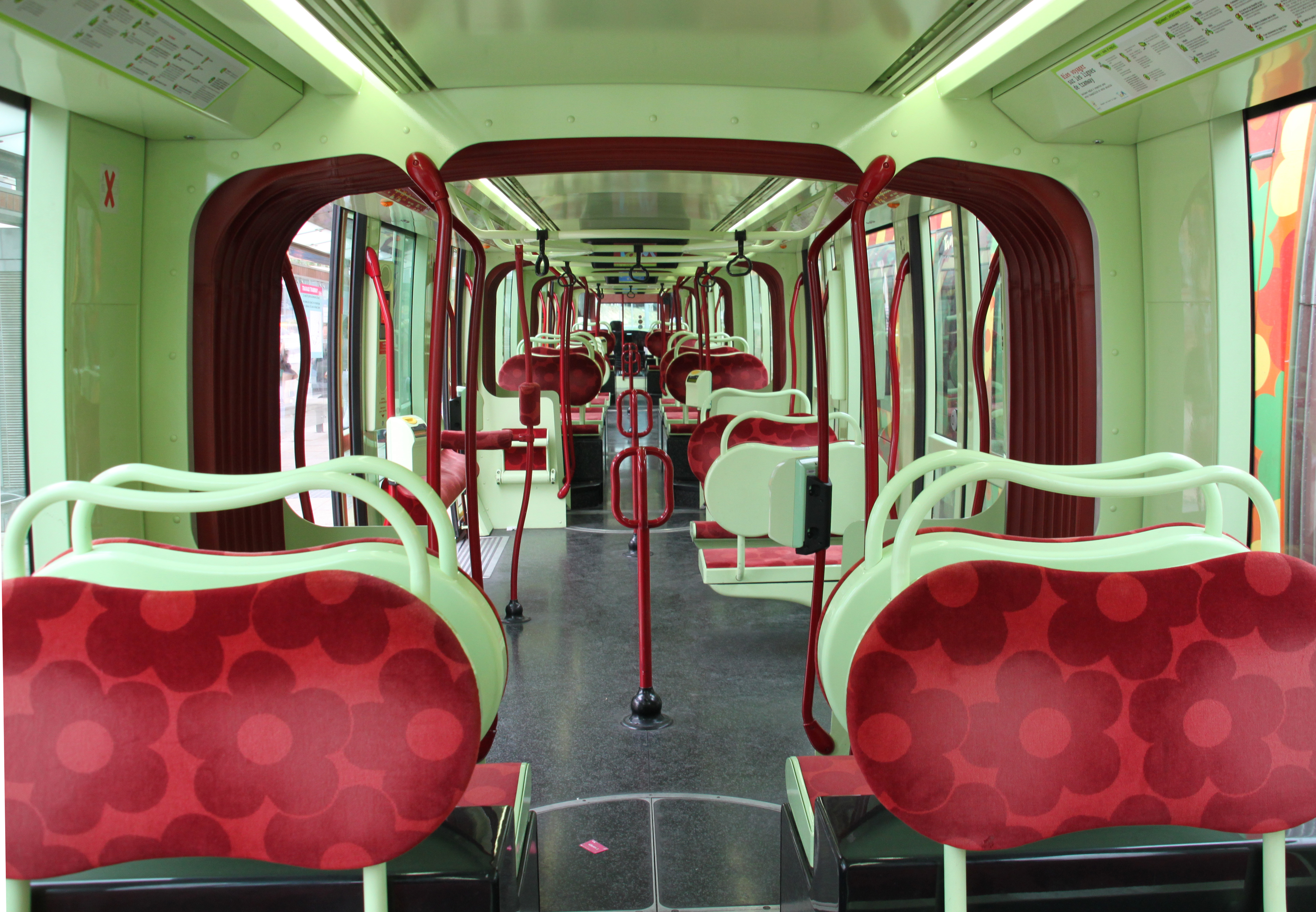 Interieur van een Citadis 302 voor tramlijn T2 in Montpellier.